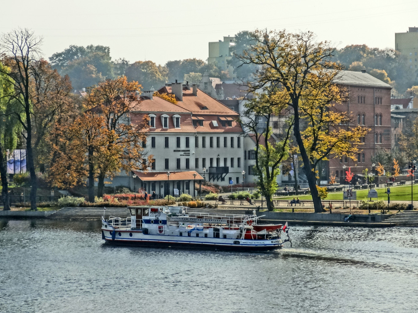 Nabrzeże północne Wyspy Młyńskiej w Bydgoszczy